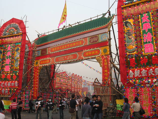 中文（香港）: 廈村太平清醮